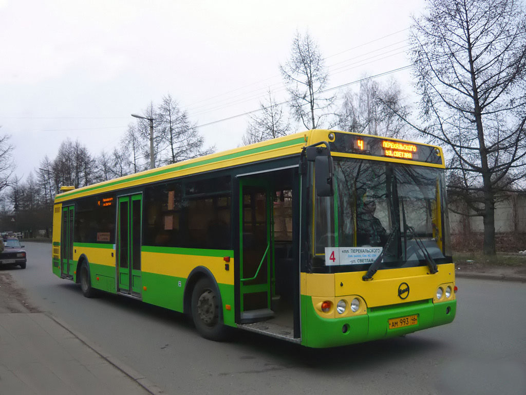 Автобус ЛиАЗ-5292.00 в Курске.